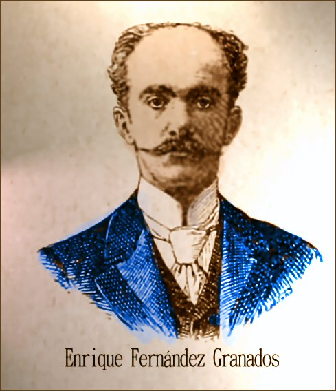 Enrique Fernández Granados, poeta mexicano